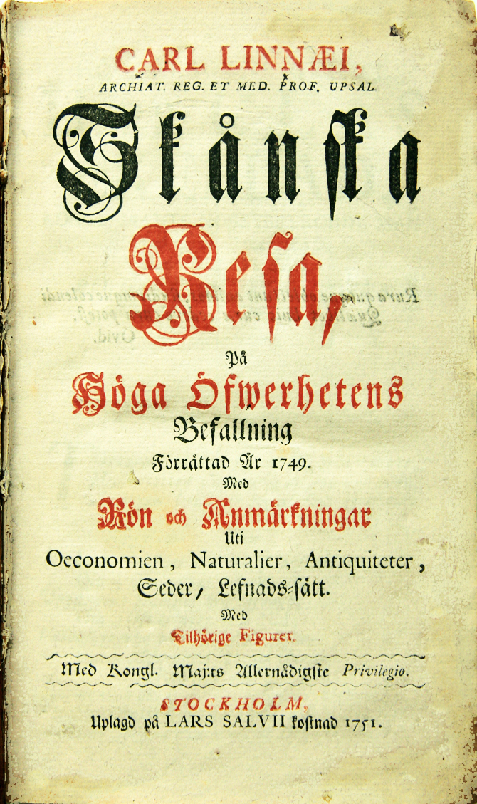 Title page of Carl Linnæi Skånska Resa. 1st ed. 1751